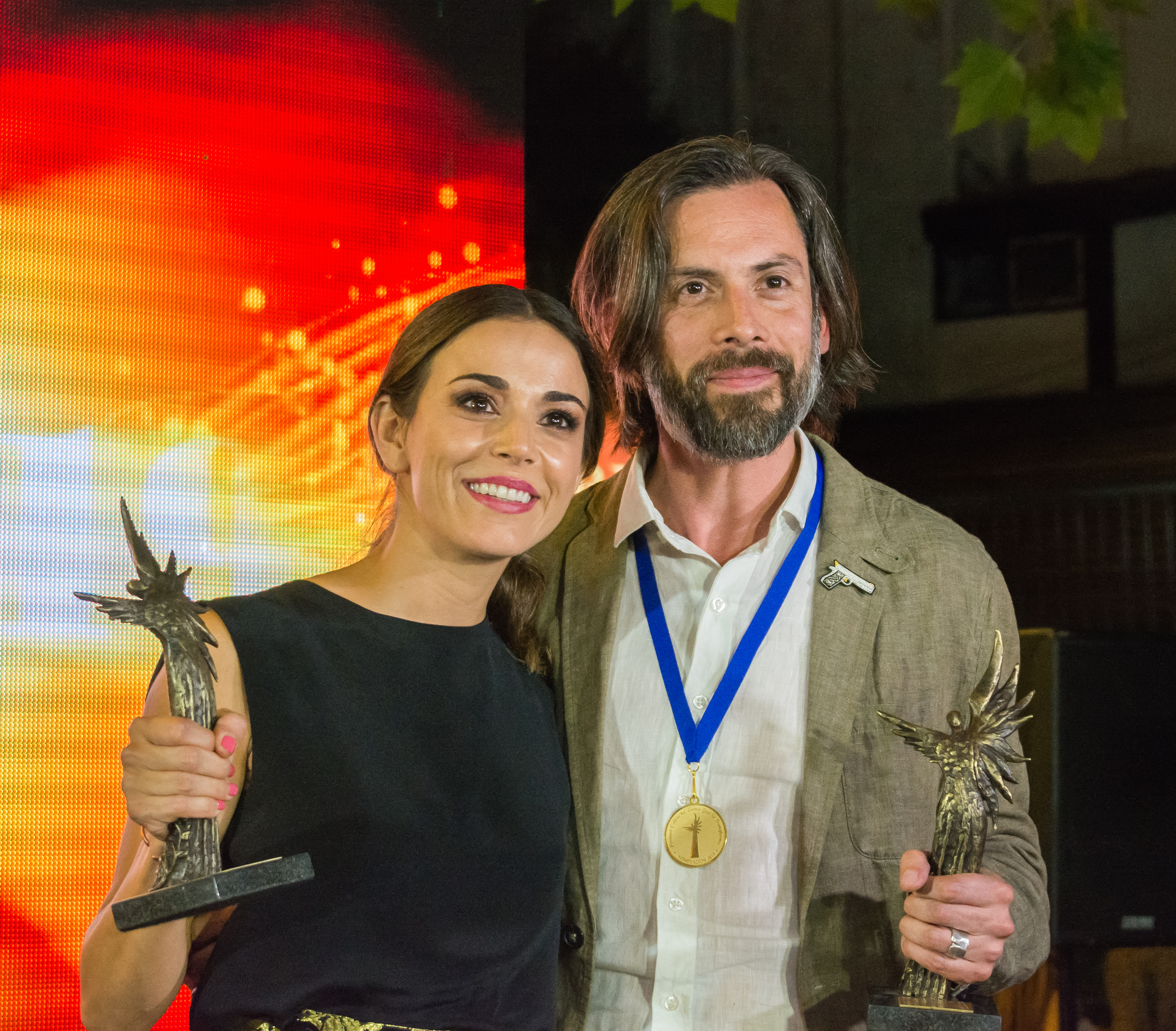 Ignacia Baeza y Néstor Cantillana, Premios Caleuche 2019, Teatro Oriente, Providencia, Santiago, Región Metropolitana de Santiago, Chile.